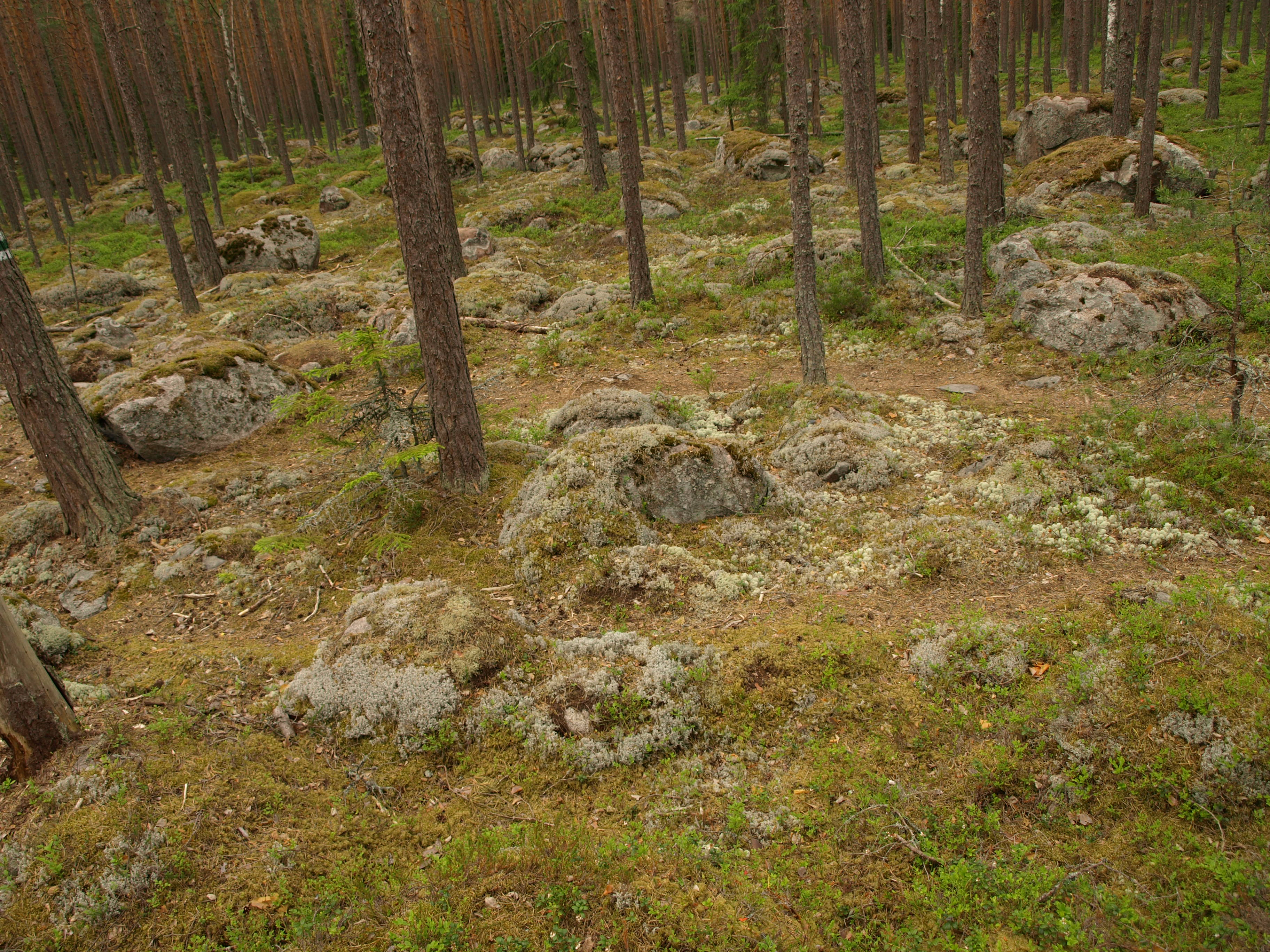 Käsmu kivikülv